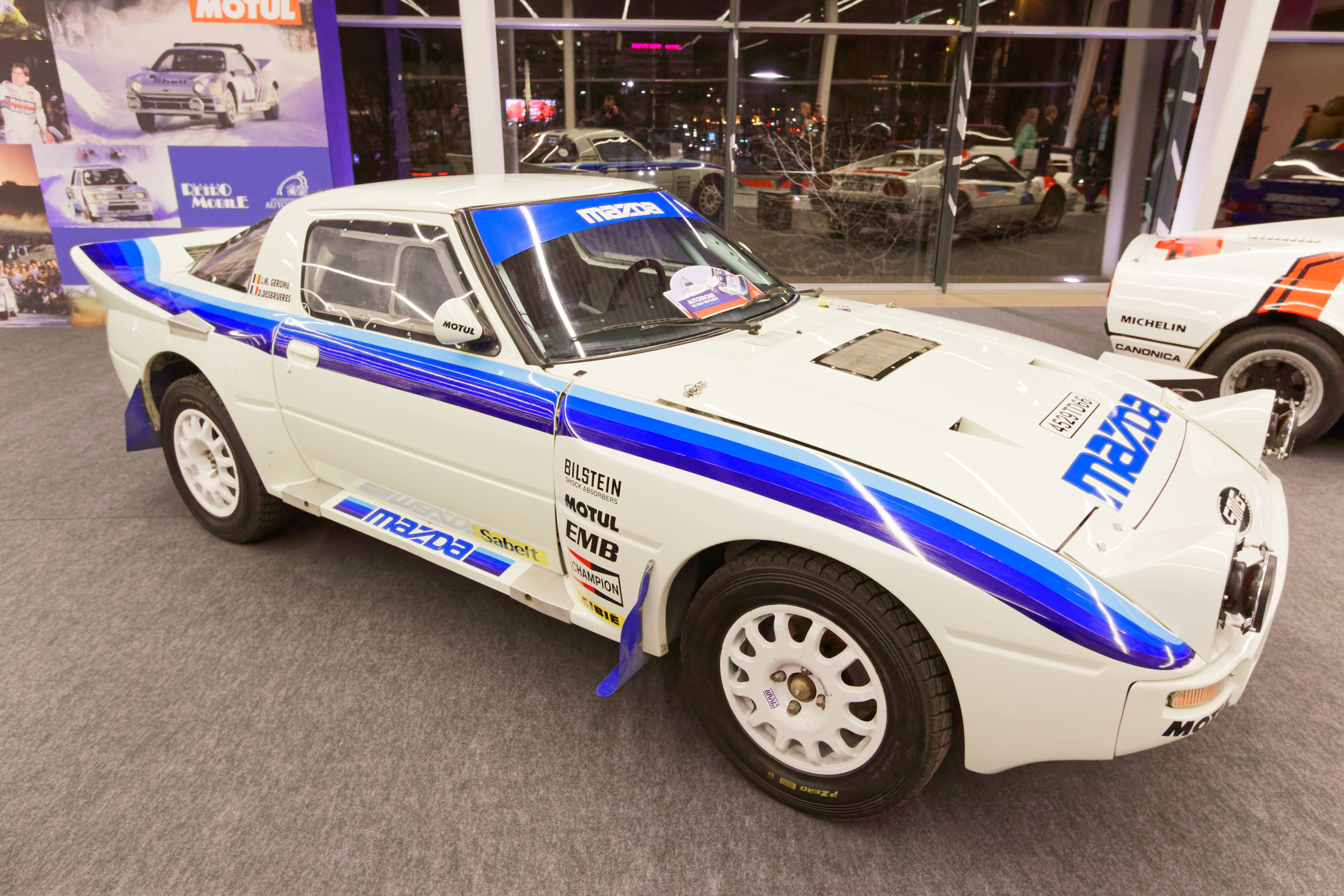 Une Mazda RX-7 de 1984 exposée lors du salon Rétromobile 2017.